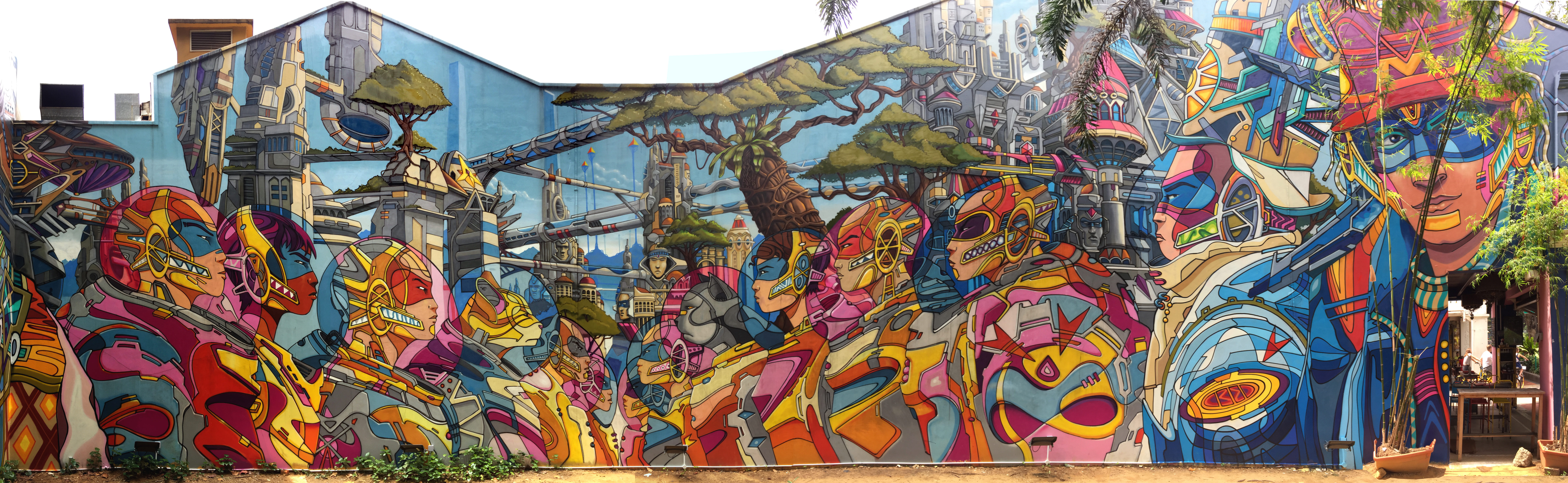 Graffiti Ophir Road à Singapore 2018